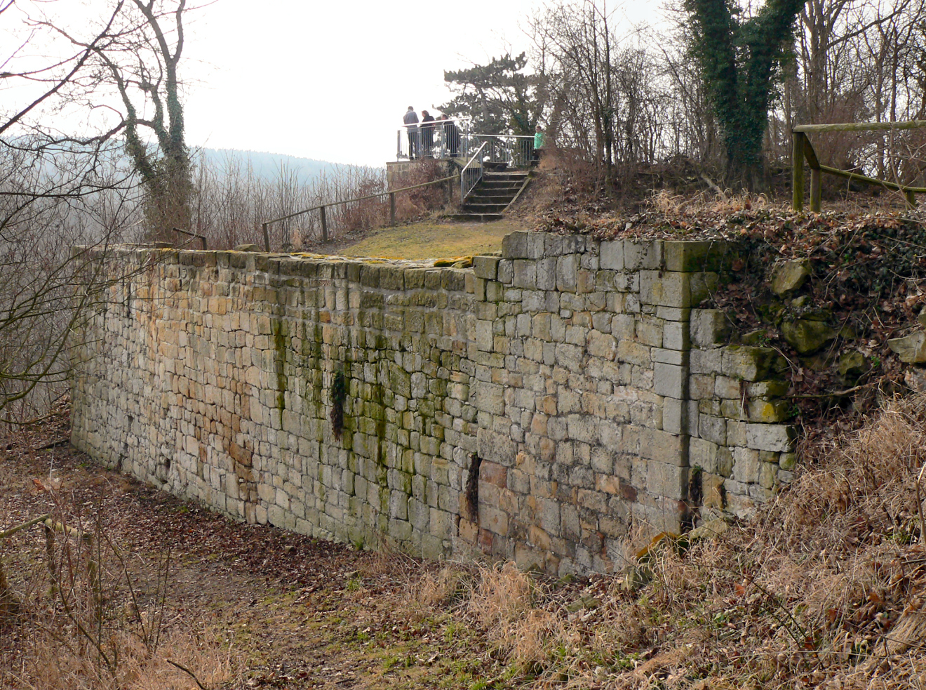 Burg Liebenburg, Aussichtsplattform auf früherem Turm bzw. Bastion